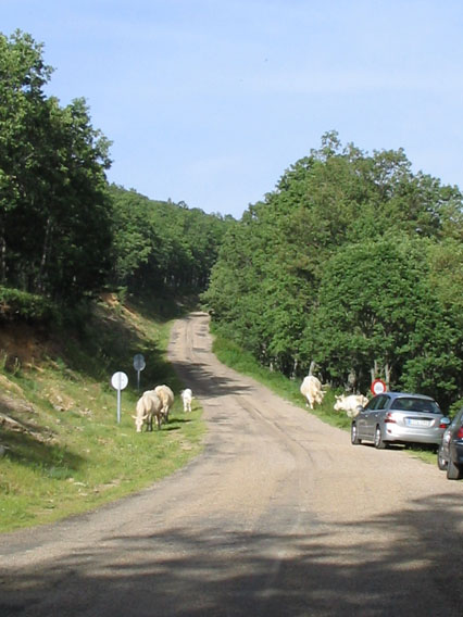 Road in La Acebeda (Madrid)